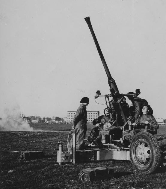 Pokazy obrony przeciwlotniczej na Polu Mokotowskim w Warszawie: armata przeciwlotnicza wz. 36 kal. 40 mm.